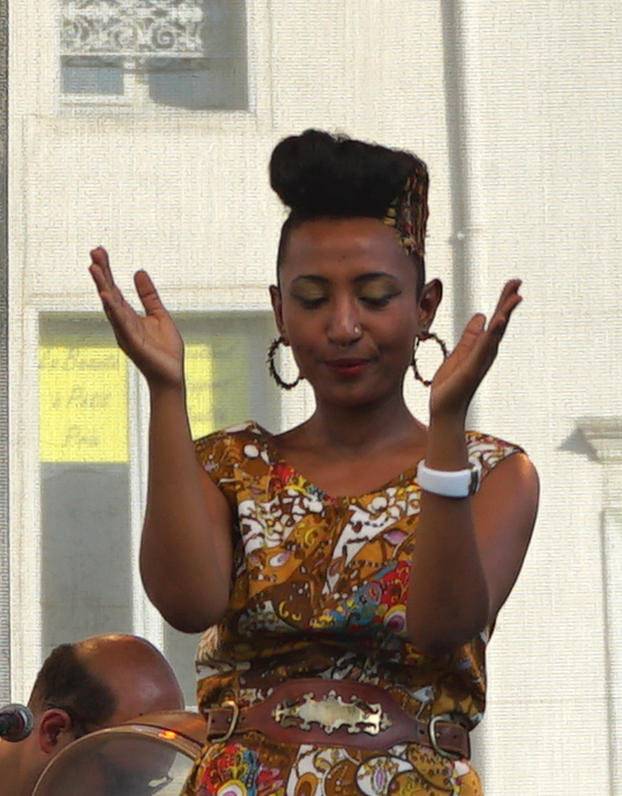 Alsarah lors du Musiques d'Ici et d'Ailleurs 2015.